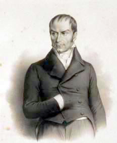 "Camilo Torres", Litografía sobre papel